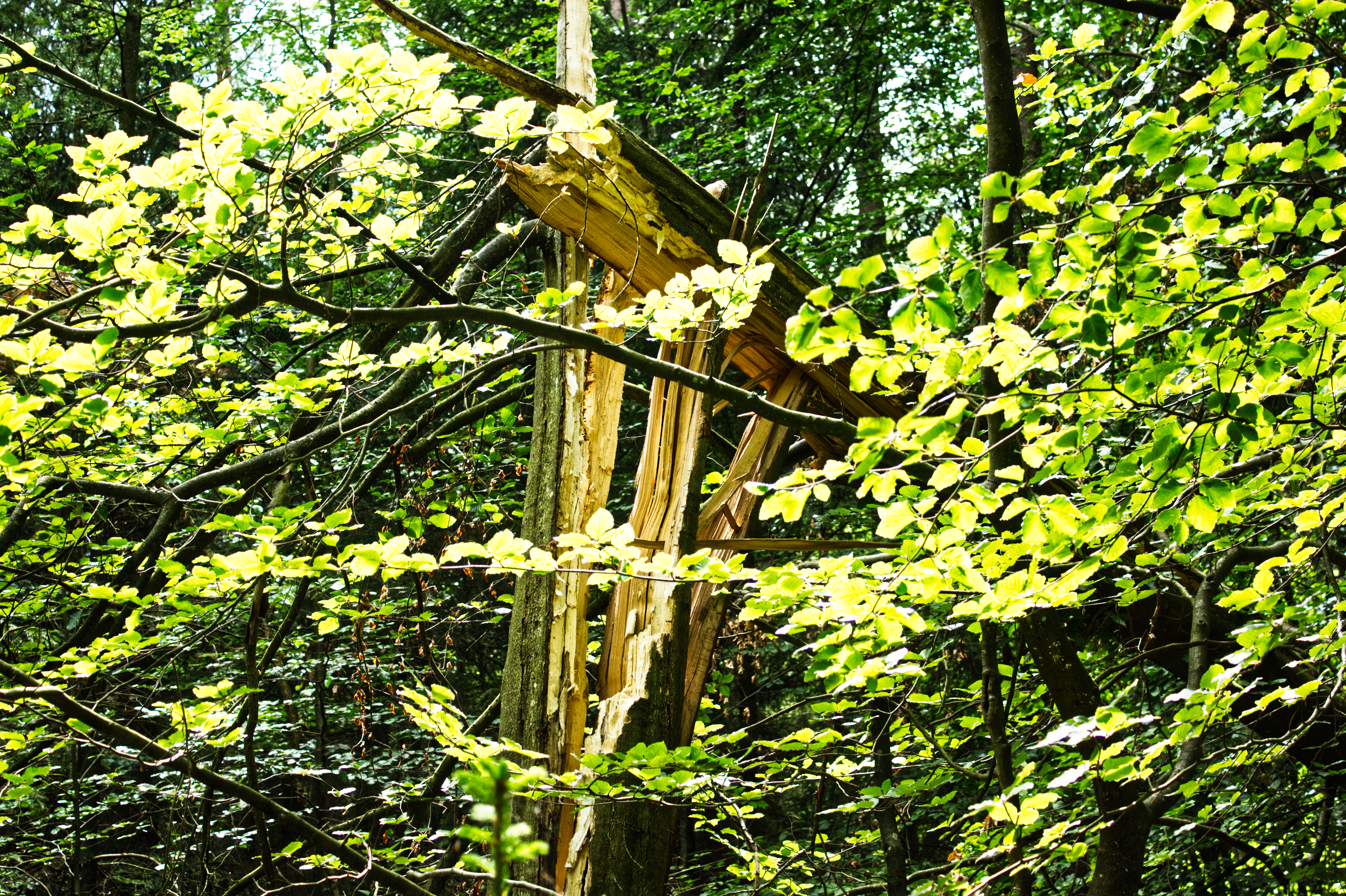 Abgeknickte Bäume werden sich selbst überlassen